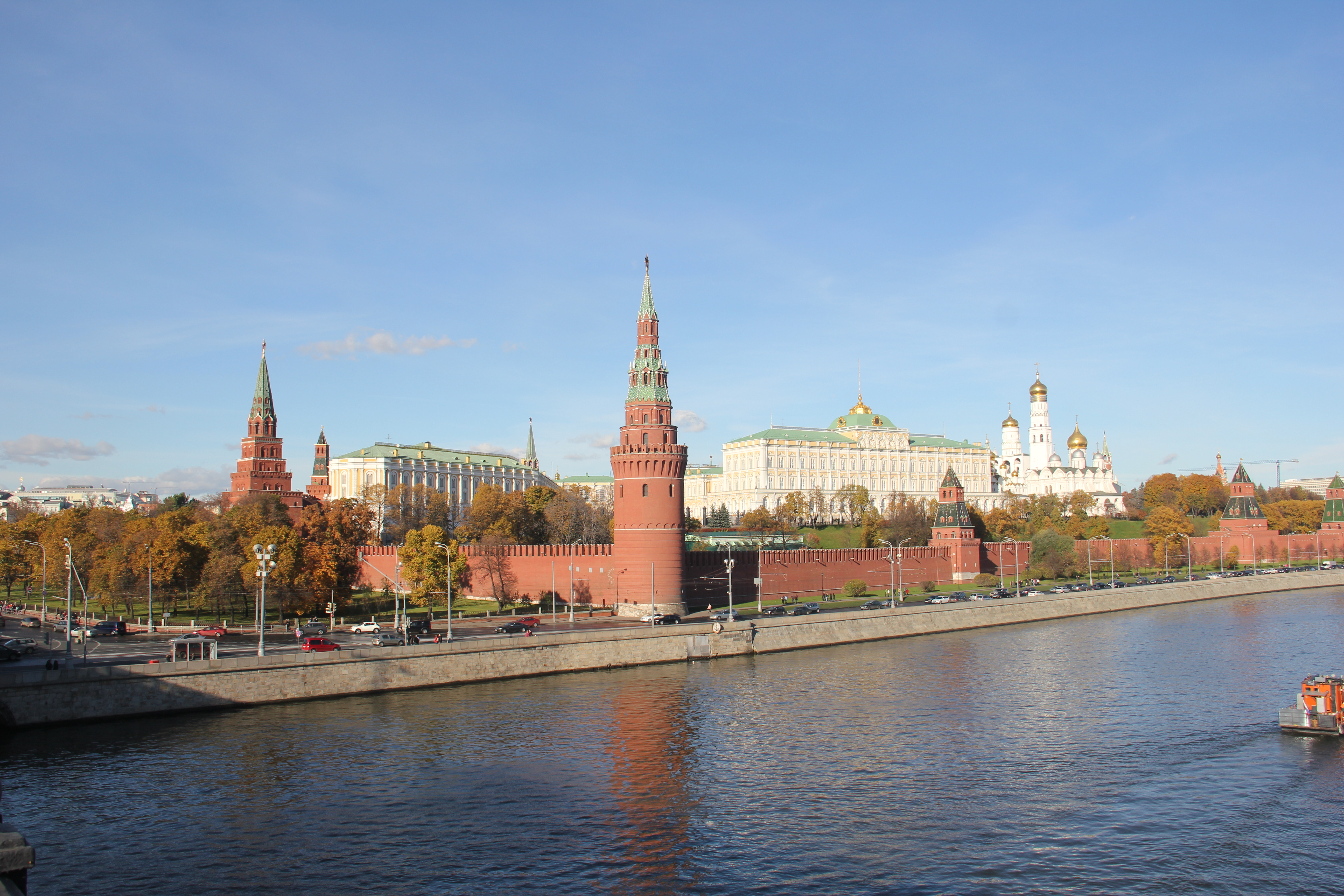 Кремль